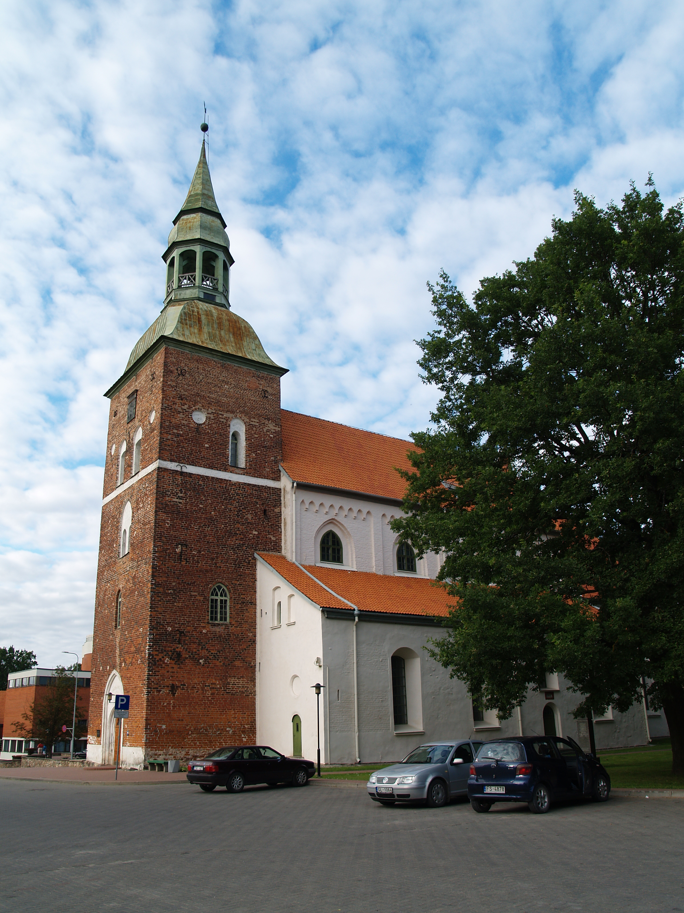 Valmiera luteriusu kirik